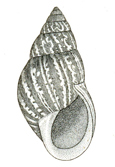 The landsnail, Bulimulus dealbatus.